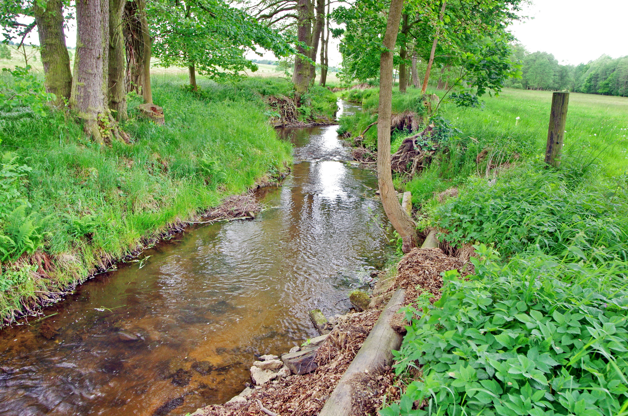 Lipoltovský potok v Mokřině, okres Cheb